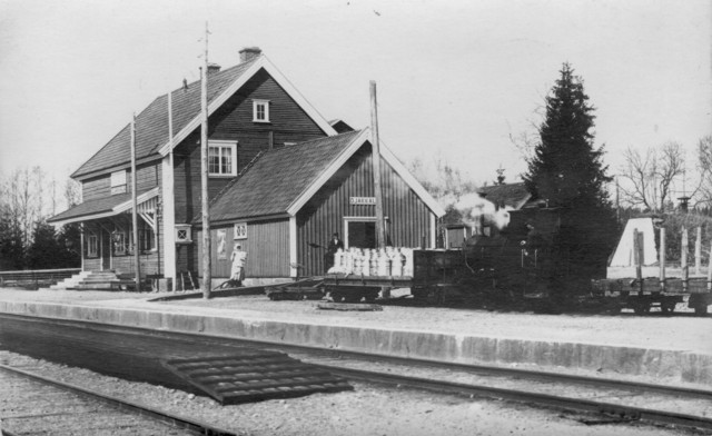 Ojakkalan rautatieasema